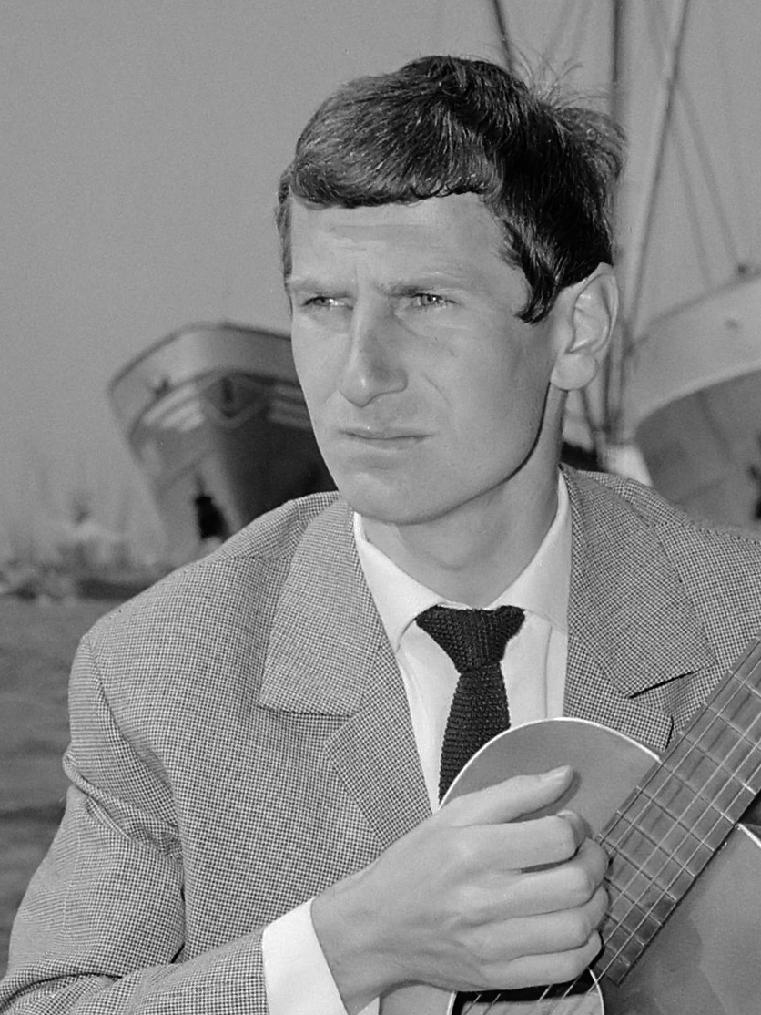 Gerard Cox in tv-show van NCRV, zanger Nederlands chanson hier bij de haven van Rotterdam 20 mei 1964